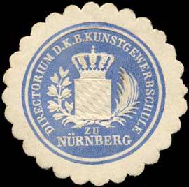 Sealing stamp Title: Directorium der K.B. Kunstgewerbeschule zu Nürnberg Description: blau, weiß, geprägt Place: Nürnberg size: 4 cm